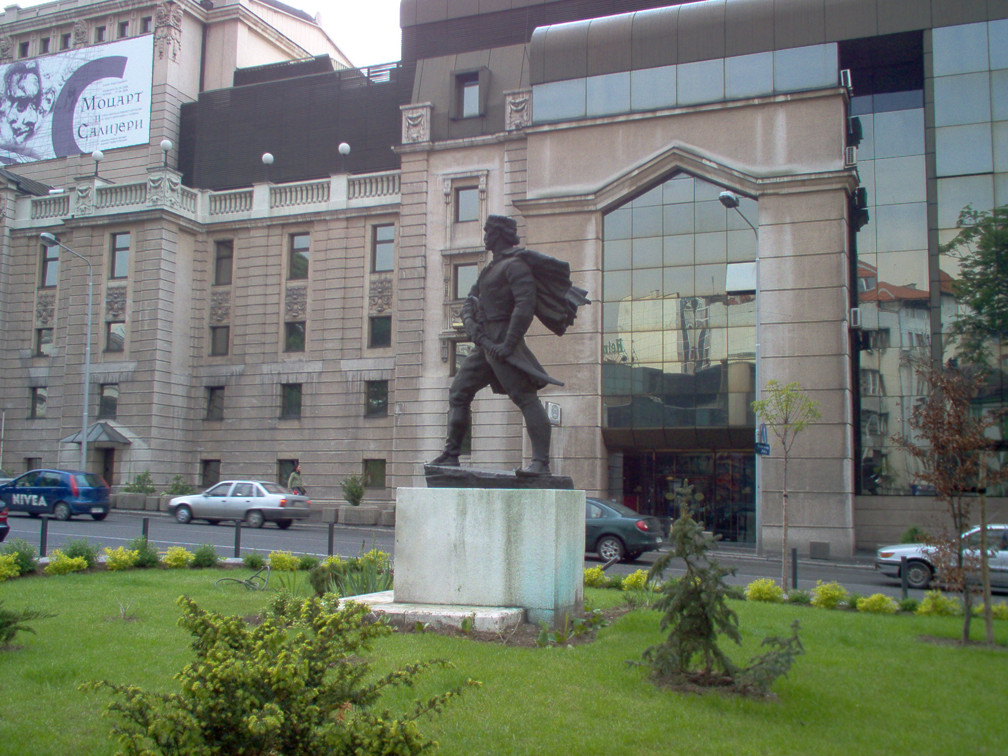 Васа Чарапић, српски јунак из Првог српског устанка, споменик код Народног позоришта у Београду, на месту где је погинуо на пар десетина метара од Стамбол капије, фотографисао Голдфингер Licensing Fotografisao Goldfinger. U javnoj upotrebi!